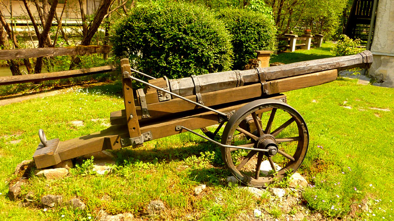 Nachbau einer Felschlange ( Tarrasbüchse ) wie sie Ende des 15.Jahrhundert im Werk des Sebald Pögl für König Maximilian I hergestellt wurde.